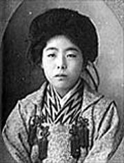 Nogami Yaeko, Portrait